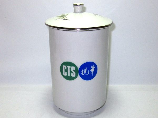 中華電視台（中華電視公司前身）第一代商標時期白色陶瓷茶杯。